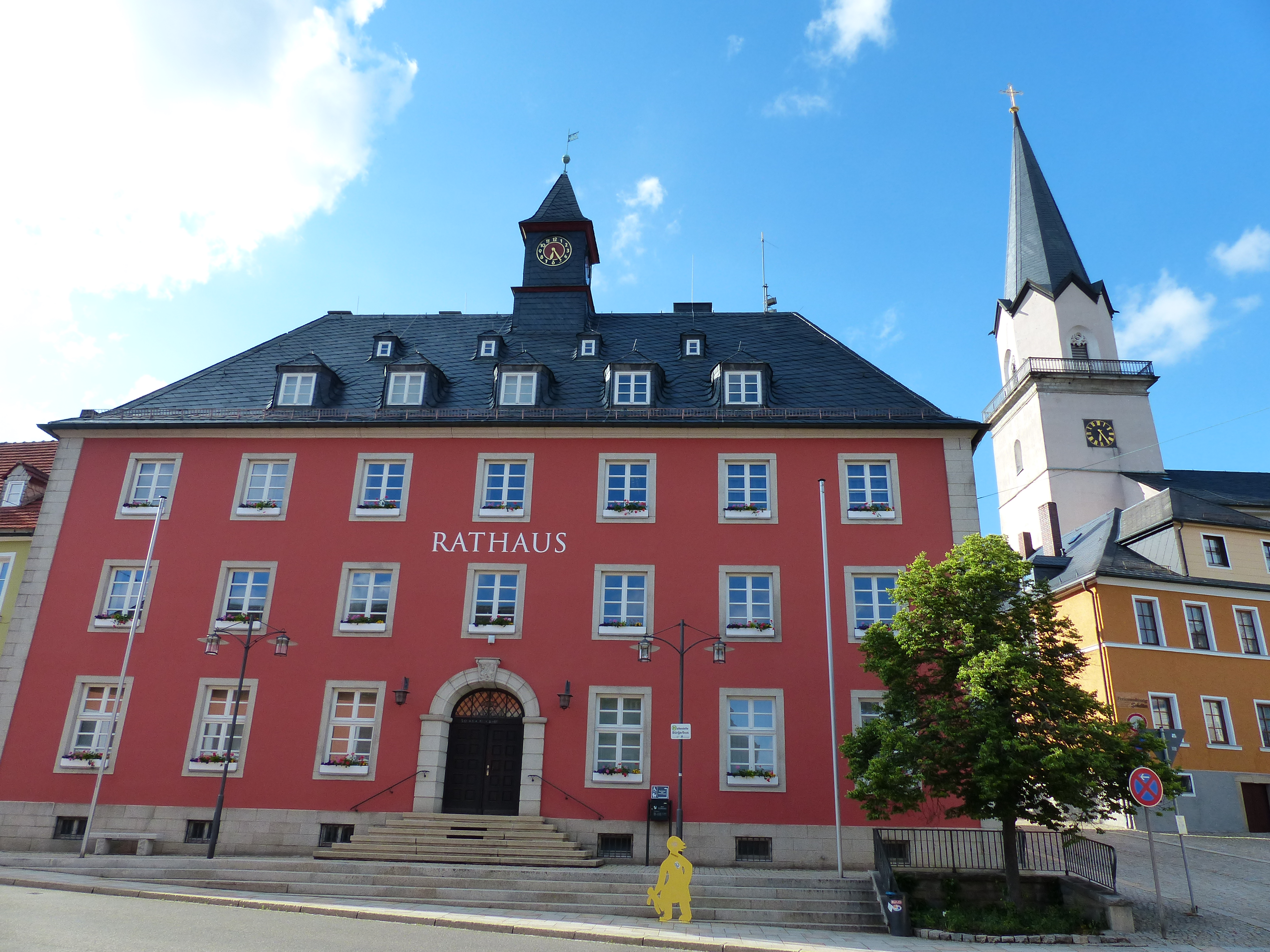 Ortsansichten von Kirchenlamitz